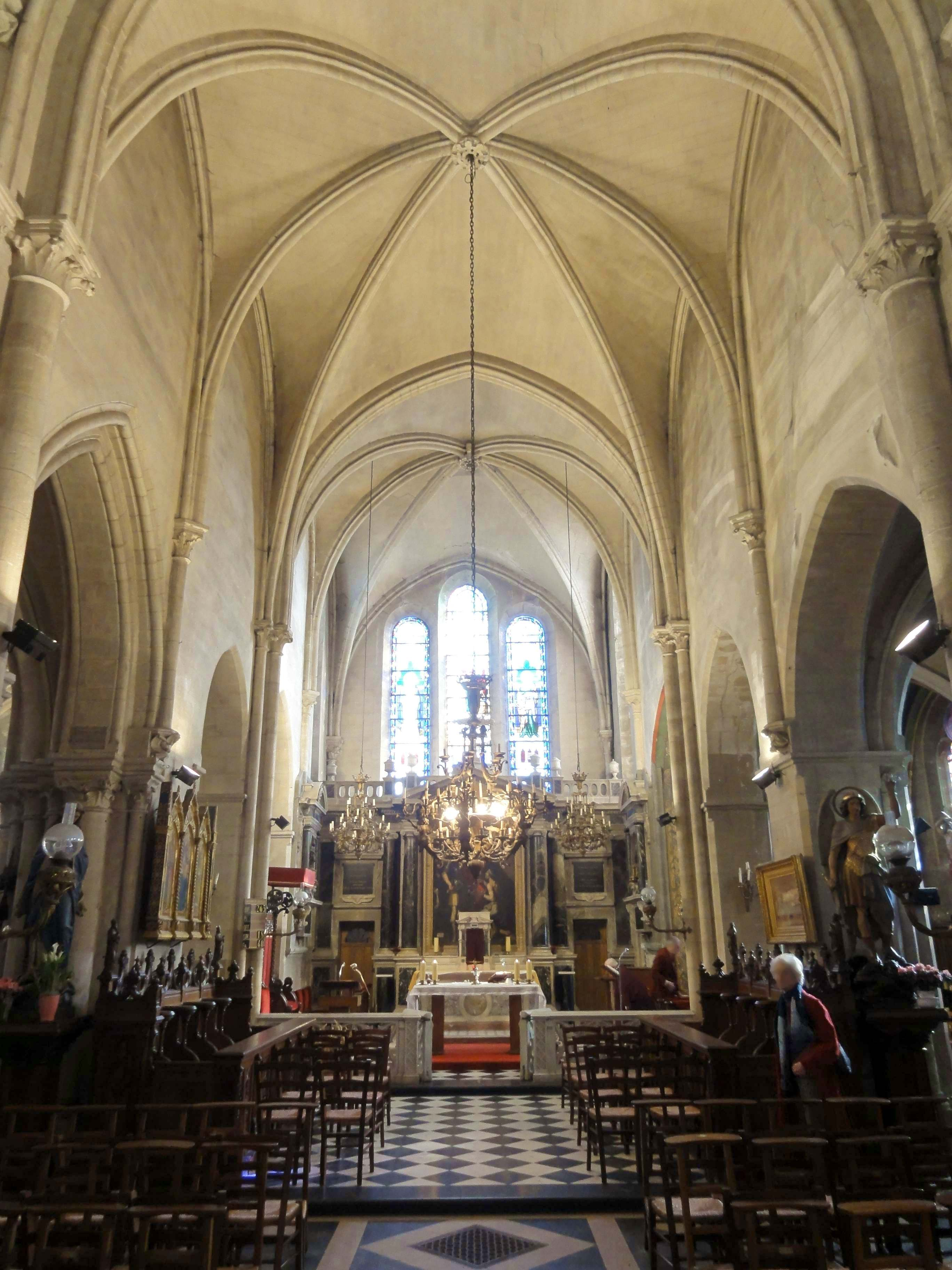 Voir titre.